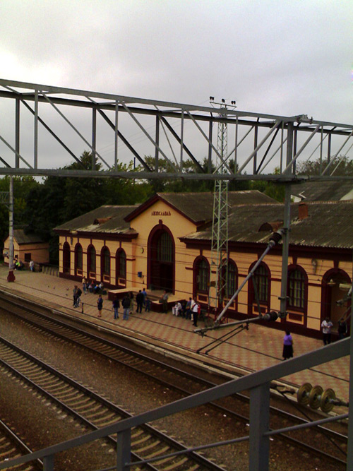 Bahnhof Lichoslawl. Lichoslawl Лихославль.